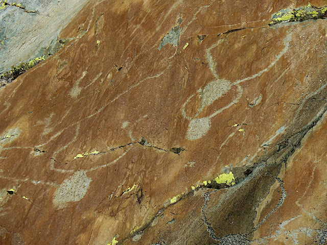 Omniprésent dans la Vallée des Merveilles et à Fontanalbe, les représentations de boeufs ou taureaux